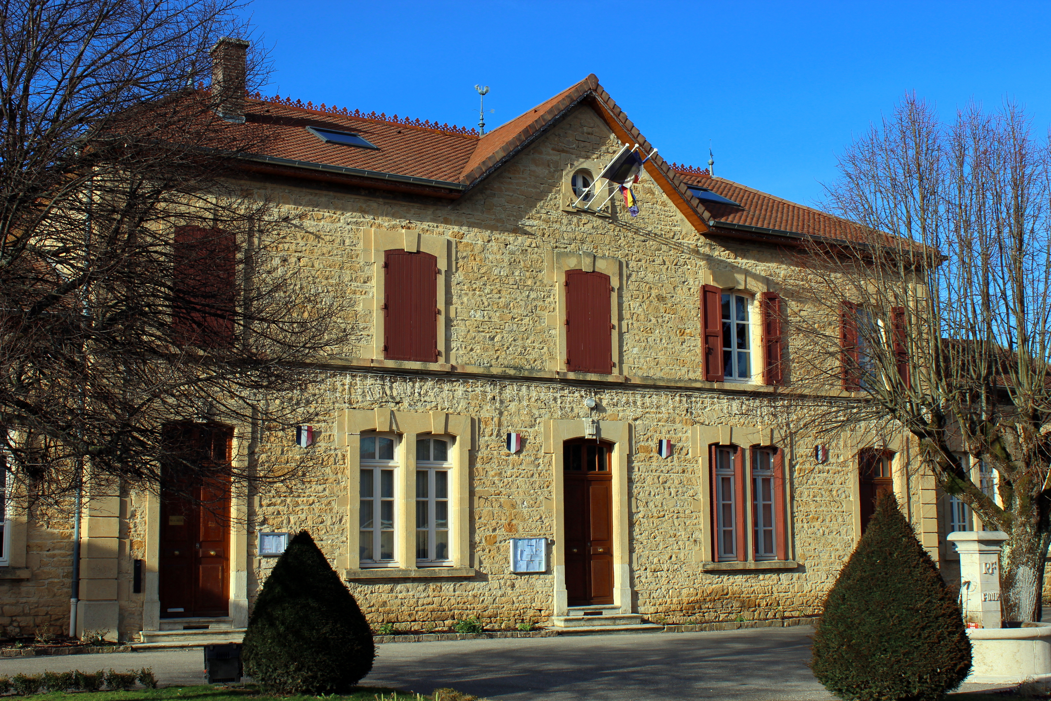 Hotel de ville à Four.